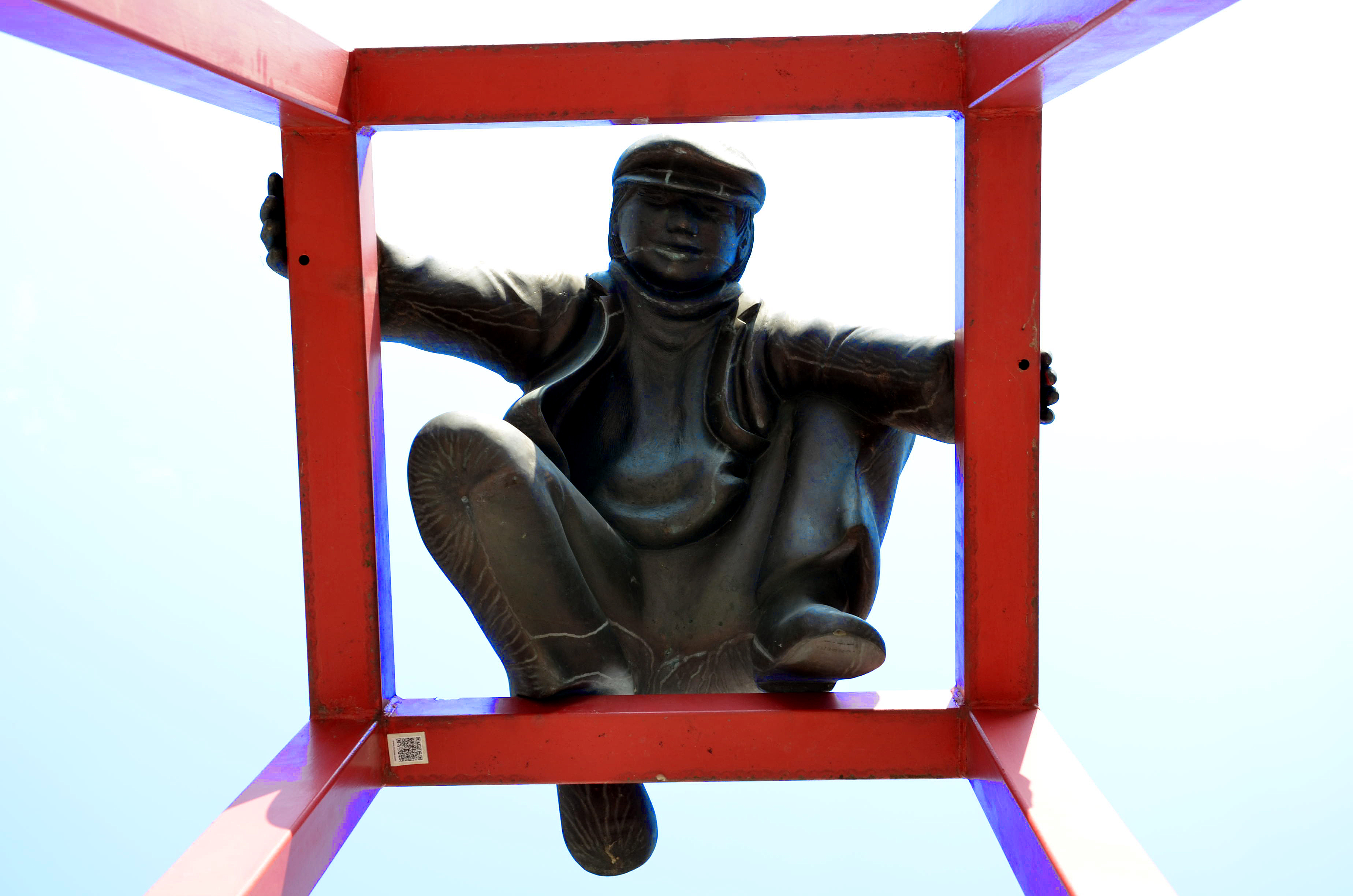 Die Figur des Lindener Butjers war eine von der damaligen Lindener Volksbank (heute: Hannoversche Volksbank) an die Bildhauerin Ulrike Enders in Auftrag gegebene Arbeit. Die Künstlerin hat die Figur eines typischen Arbeit-Jungens als kletternden „Lausbuben“ zur besseren Sichtbarkeit erhöht auf ein rotes Stahlgerüst montiert. Die Plastik wurde 1990 in der Minister-Stüve-Straße 22 im hannoverschen Stadtteil Linden-Mitte aufgestellt ...